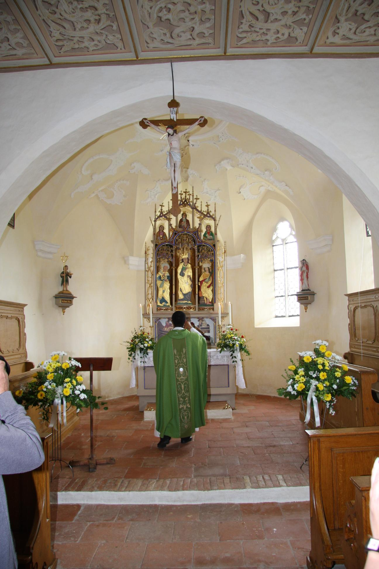 Der Innenraum der St. Ursula-Kapelle Hohenfurch bei der Segnung